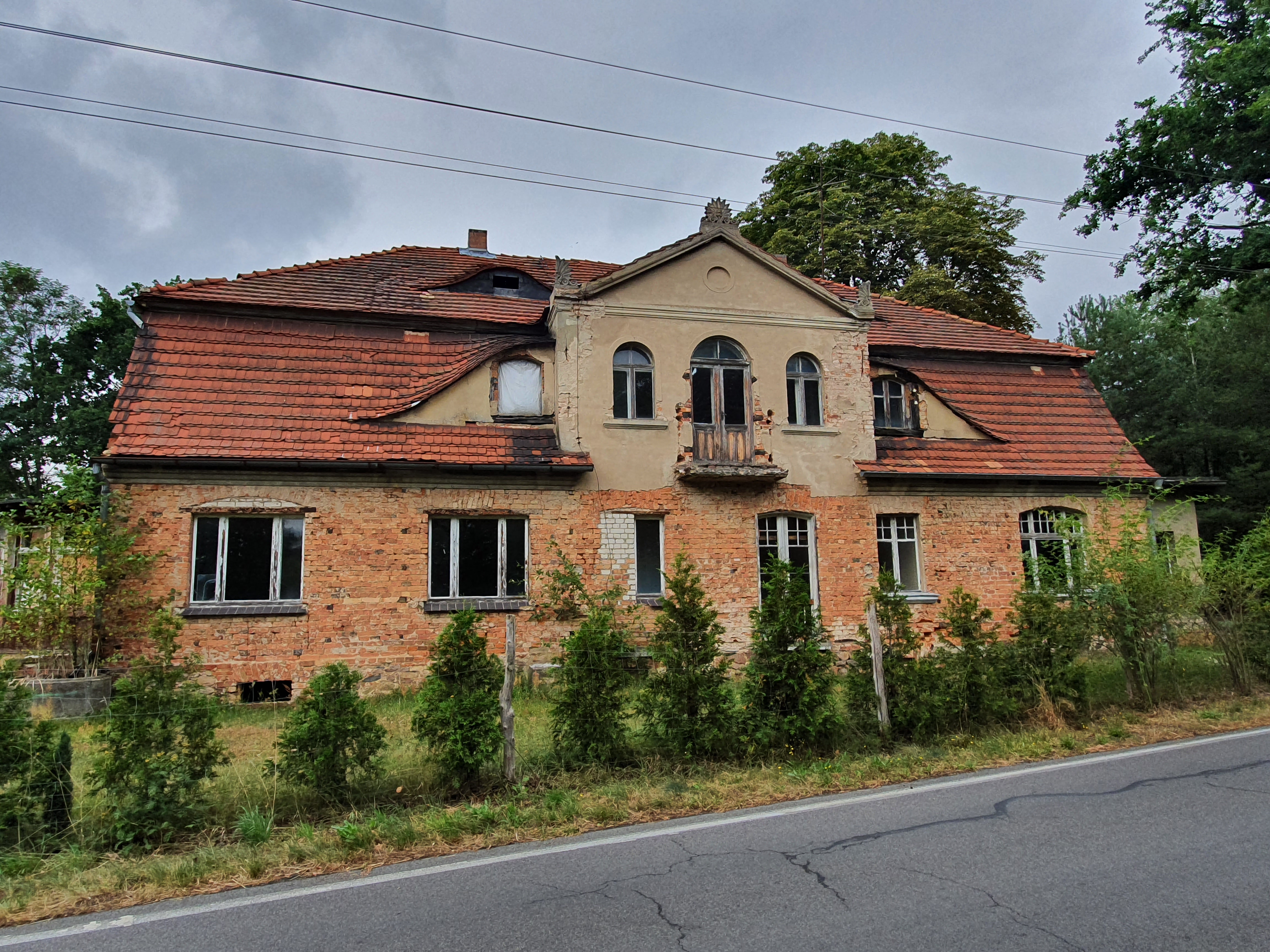 Das unter Denkmalschutz stehende Herrenhaus in Gosda II, einem Dorf im Landkreis Spree-Neiße im Südosten des Landes Brandenburg.